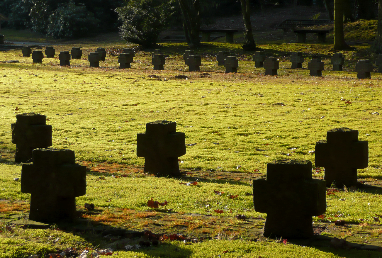 Kriegsgräber auf dem Friedhof Am Wehl